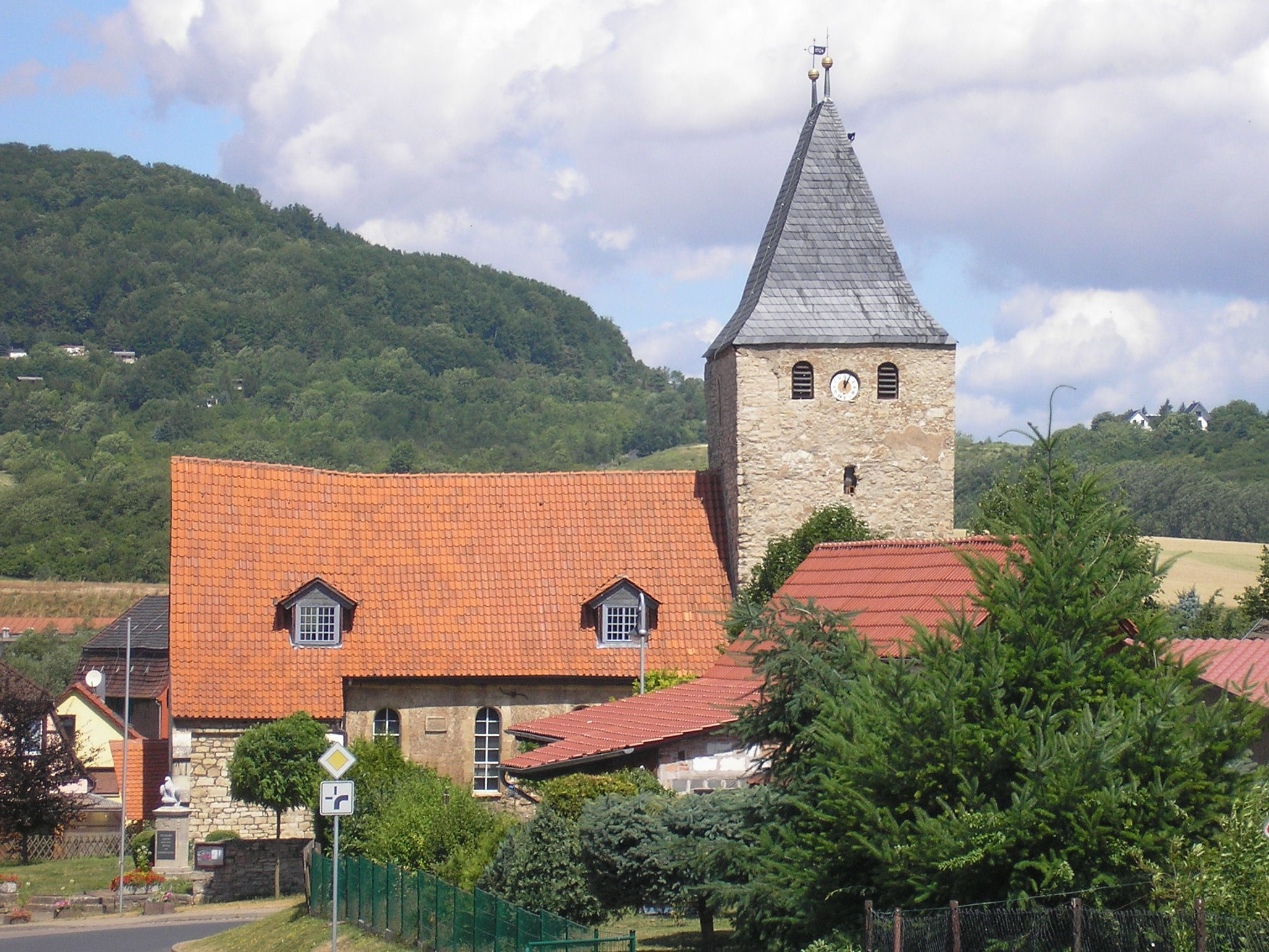 Die Kirche in Obergebra (Thüringen) und im Hintergrund die östlichen Ausläufer der Bleicheröder Berge (Ostrand der Teufelskanzel).